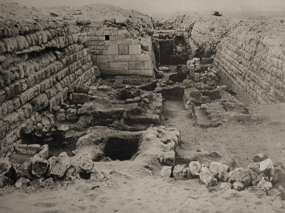 Blick auf die Südostecke der Mastaba des Ka-ni-nisut im Westfriedhof von Giza